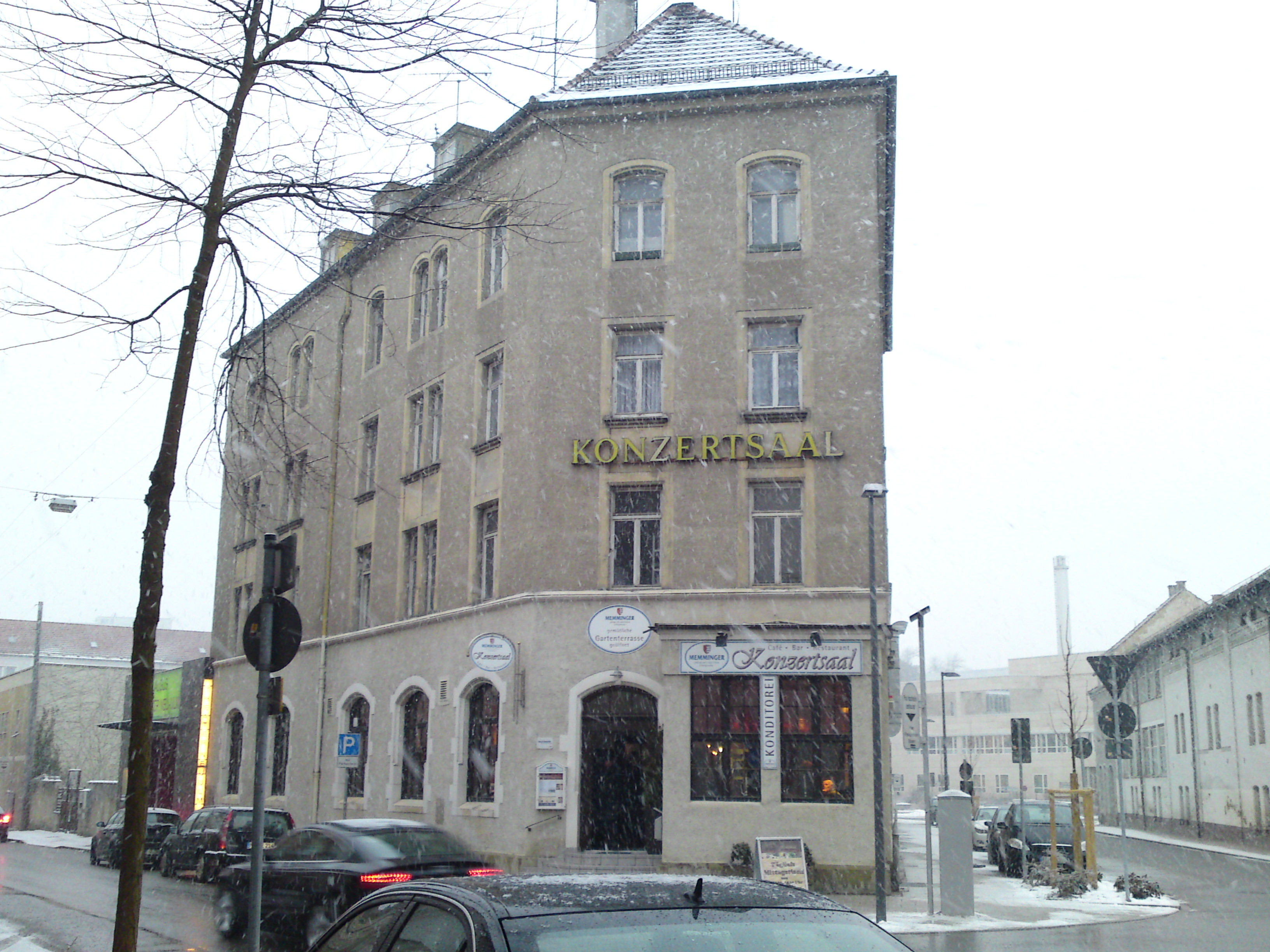 Der Konzertsaal in Neu-Ulm, an der Gabelung Silcherstraße (links)/Krankenhausstraße (rechts); erbaut um 1900, in der ersten Hälfte des 20. Jahrhunderts gesellschaftlicher Treff, Vereinslokal, Ort politischer Versammlungen und Kundgebungen; nach 1945 provisorisches Kino, Tanzsaal, Ort für allerlei Feste (Vereine, Hochzeiten), erster Auftrittsort der "Scorpions" in der Region, bei "Schwoißfuaß" 1300 Besucher, bei den "Missfits 700, seit über 20 Jahren auch Theaterraum; in die Gaststätte zog Anfang 2004 das alteingegessene Café Häberle (vorher am Petrusplatz), 2001–2012 feste Spielstätte des AuGuSTheater Neu-Ulm. 2012 abgerissen.